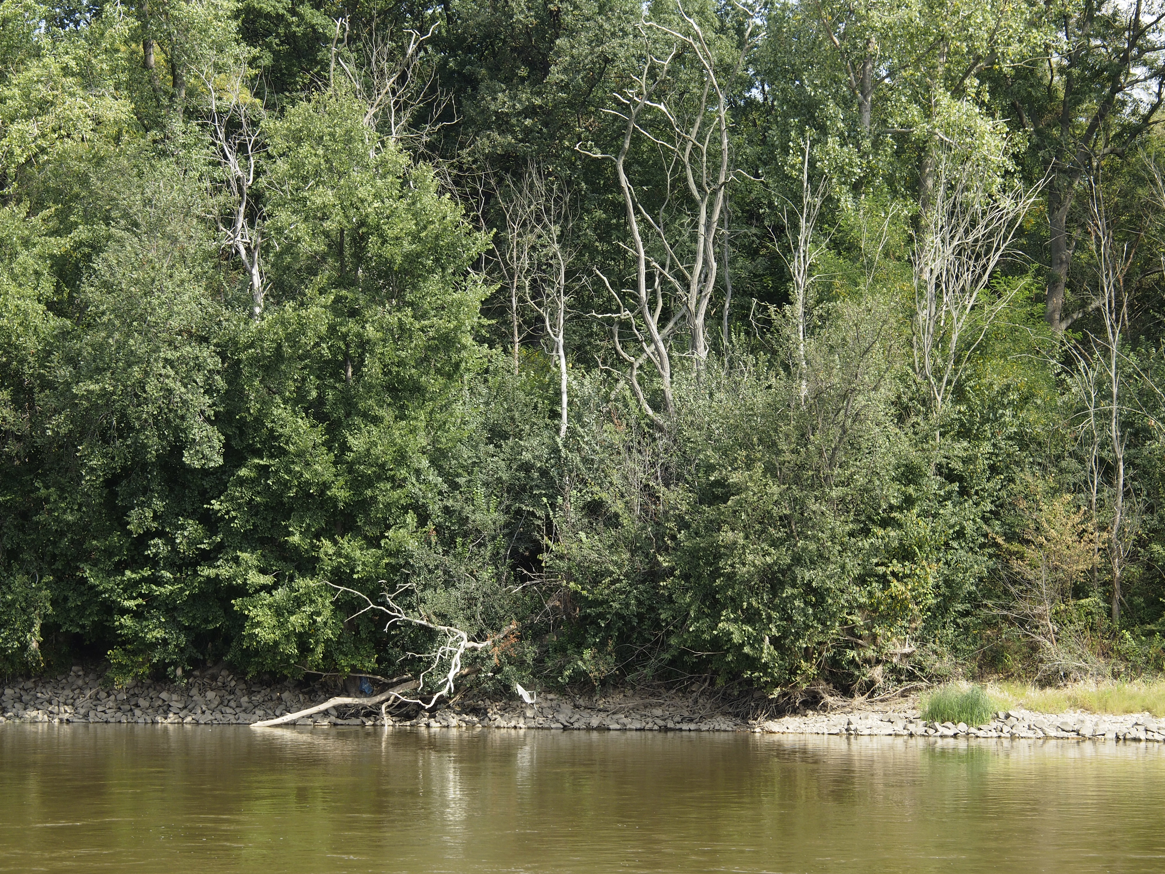 Gauernitzer Elbinsel - naturbelassener Wald